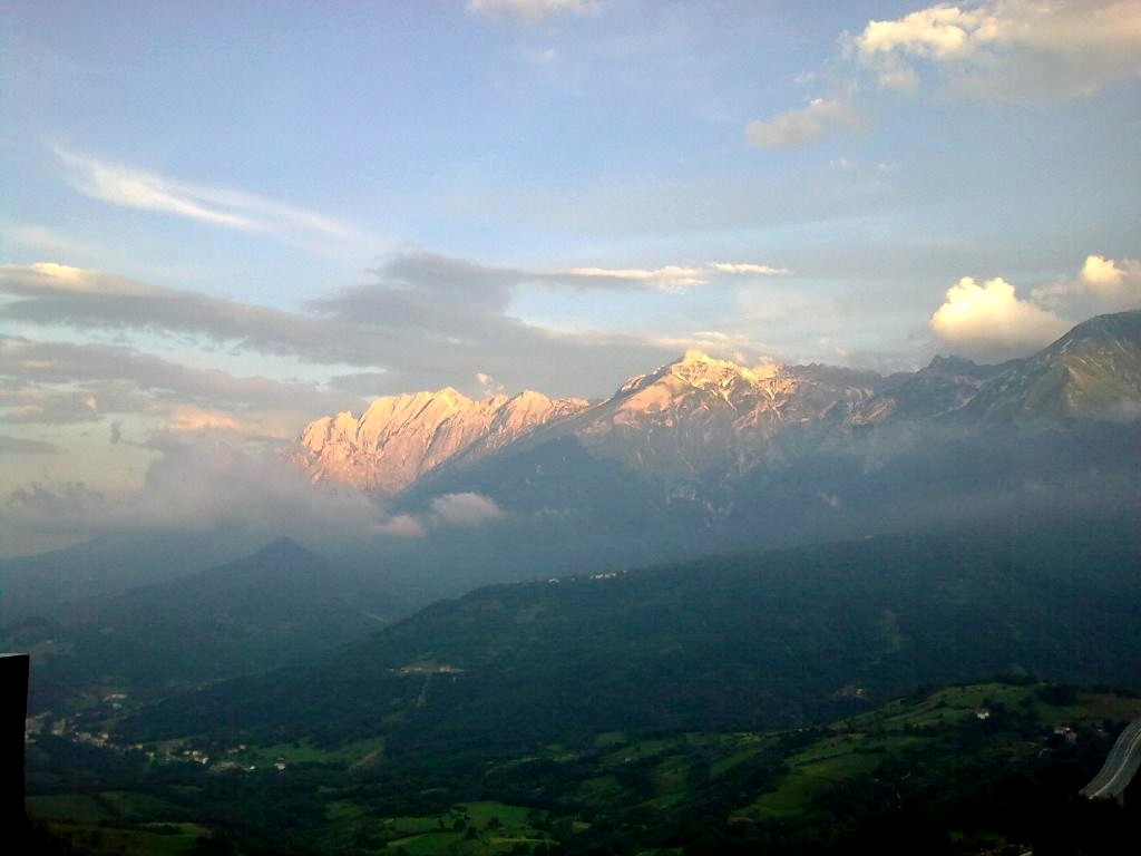 vista della catena del gran sasso dal paese di Forca di Valle